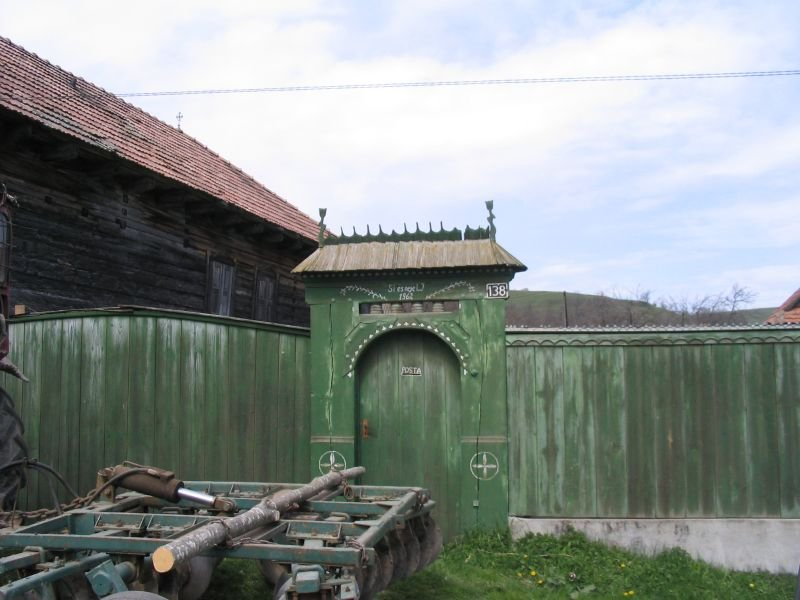 Kászonjakabfalvi kapu, 2006